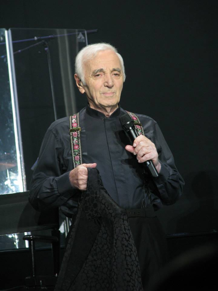 Charles Aznavour (b. May 22, 1924) – French singer